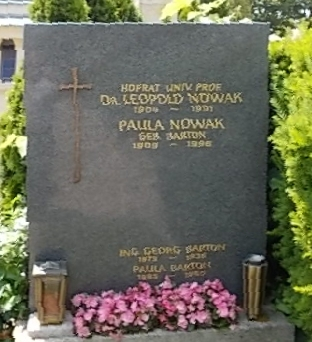 Leopold Nowak-Grinzinger Friedhof (20-6-11)